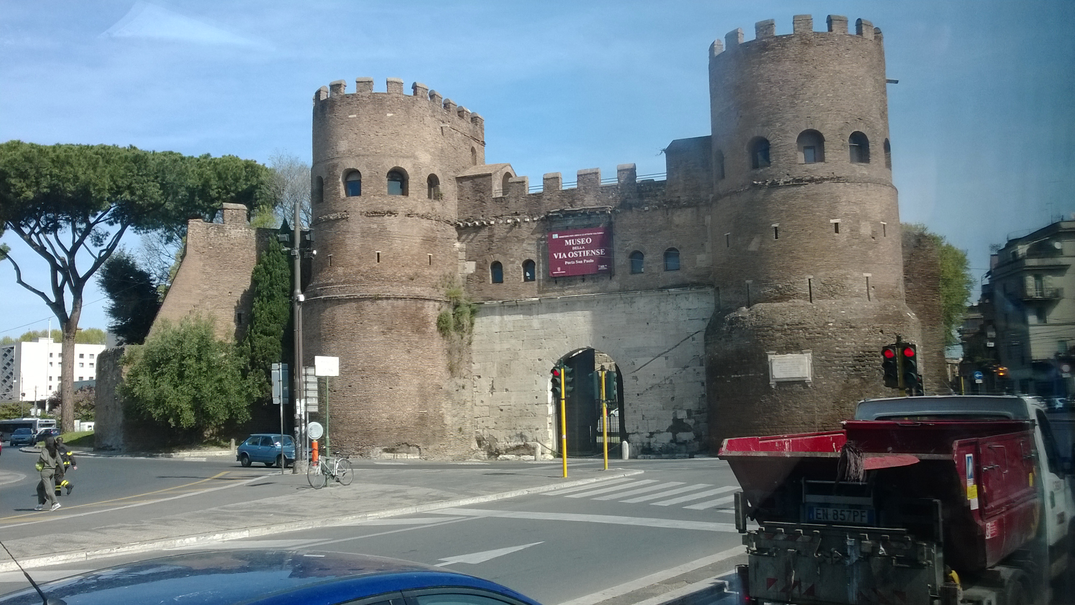 Museo della Via Ostiense Roomassa, Italiassa, huhtikuussa 2014.